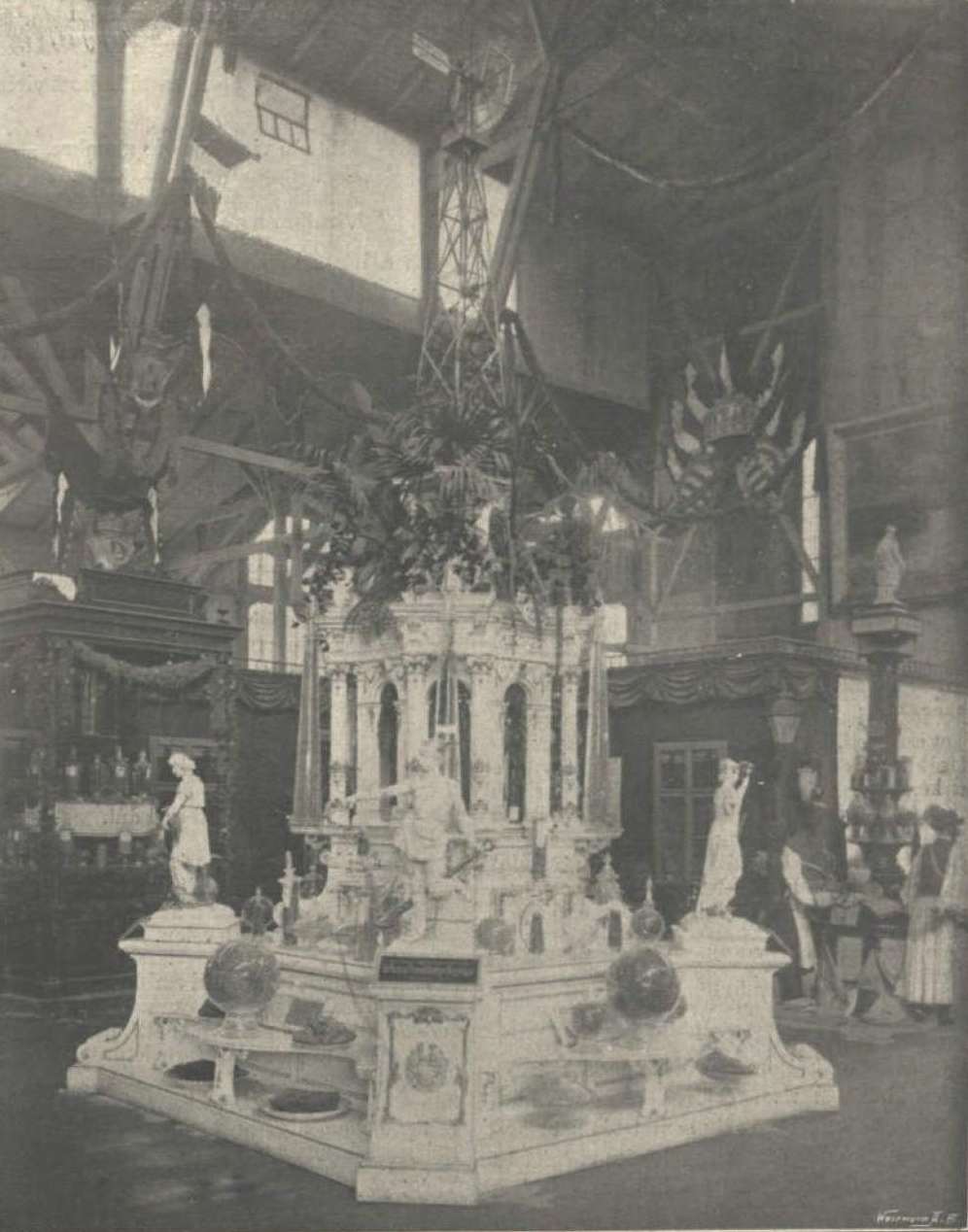 Millennium 1896